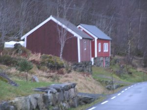 Vanylven (Krabbesti)